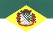 Drapeau de la municipalité de Saudades - SC - Brésil